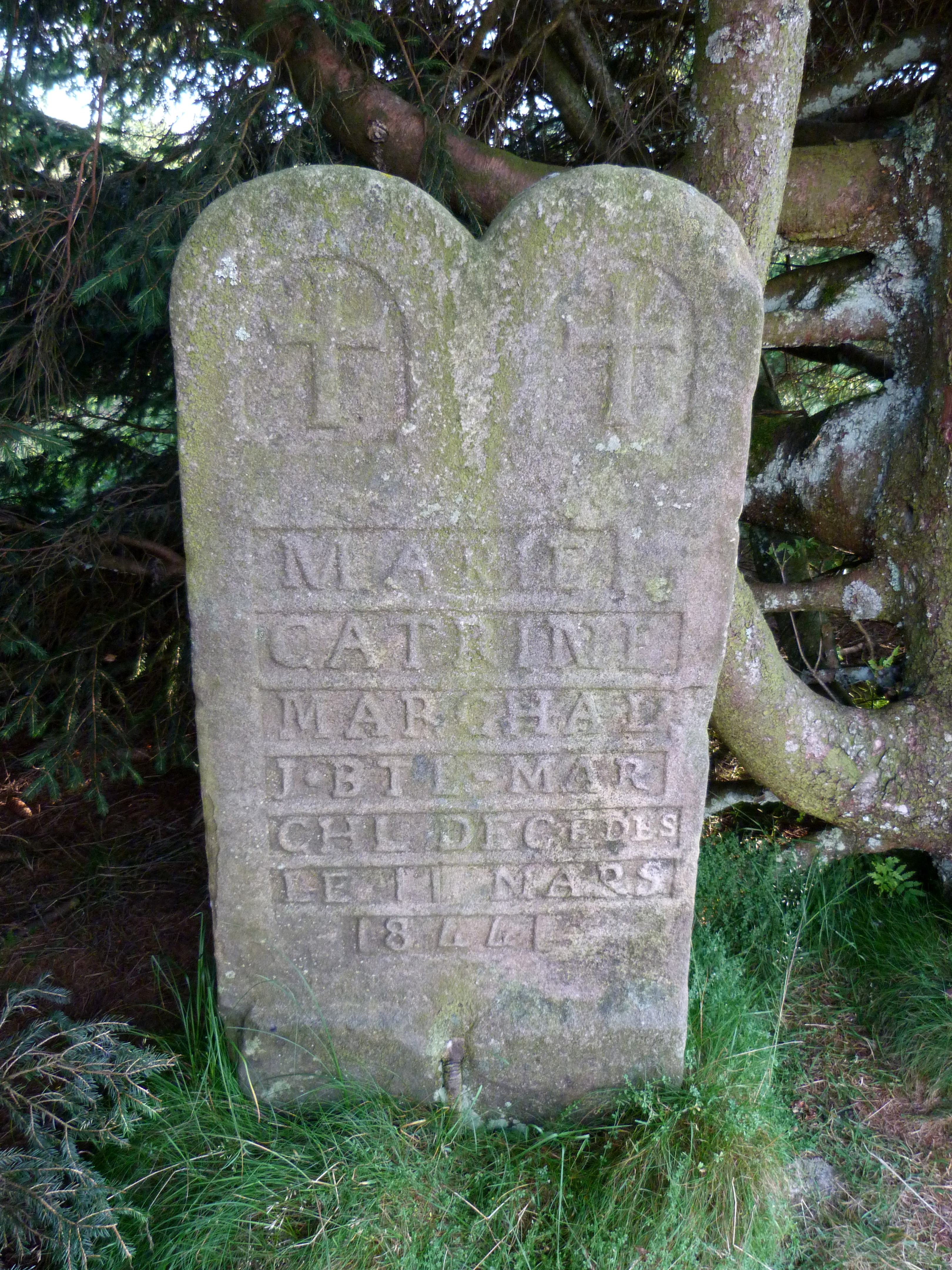 La croix Marchal au Tanet (Vosges) à la mémoire de deux enfants morts dans la neige le 11 mars 1844.